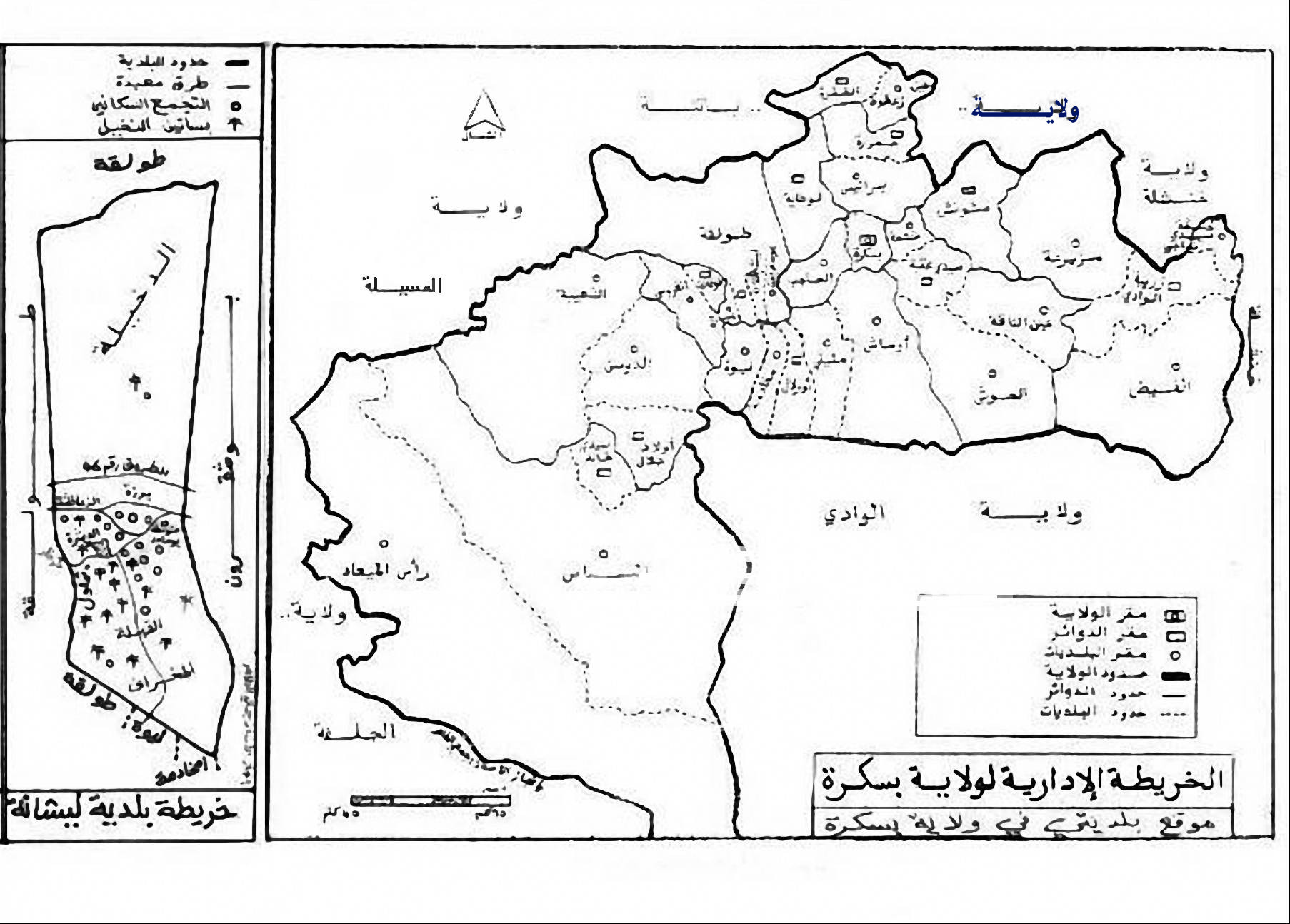 lichana